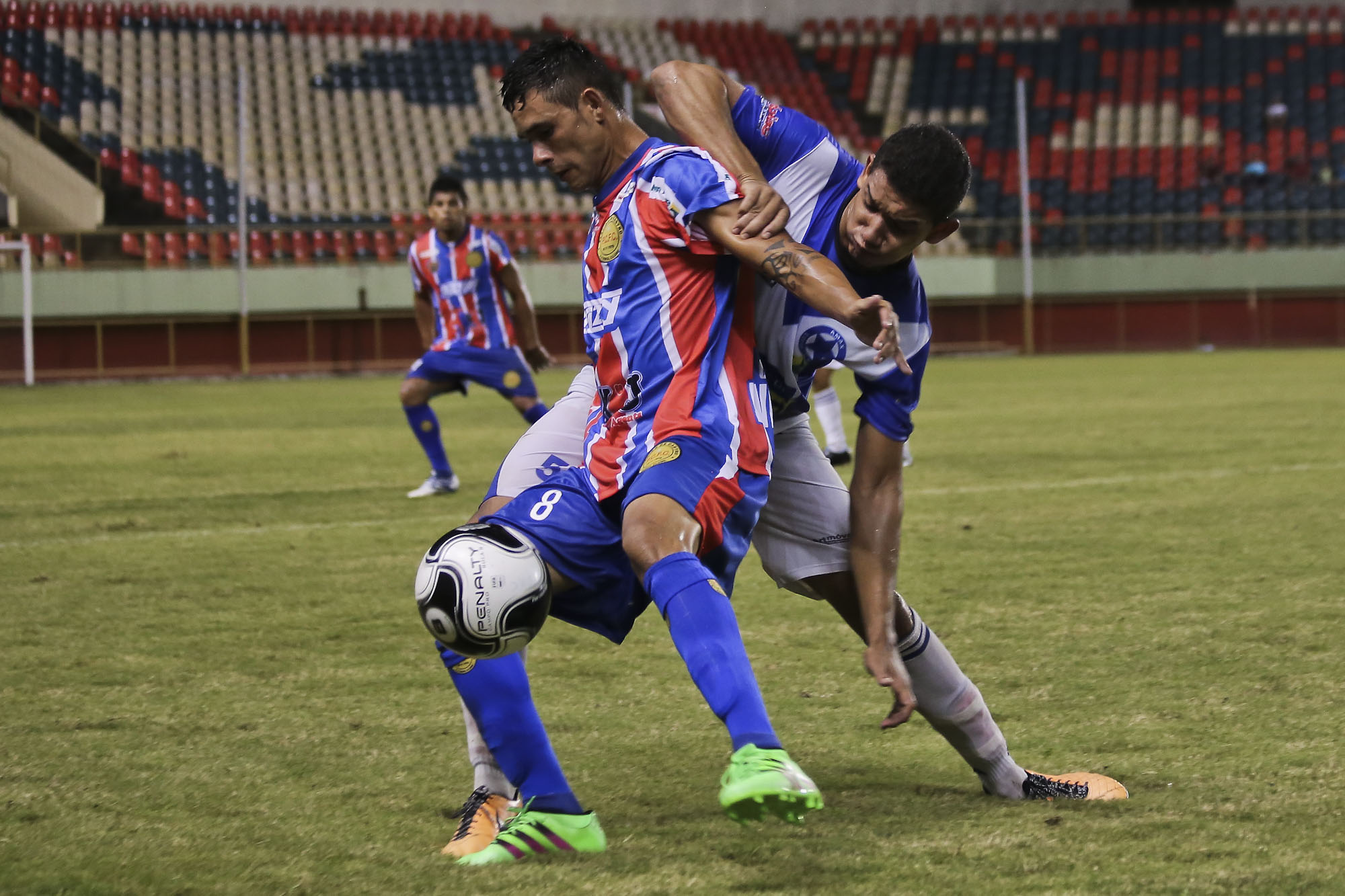 Fotos: Gleilson Miranda/Secom